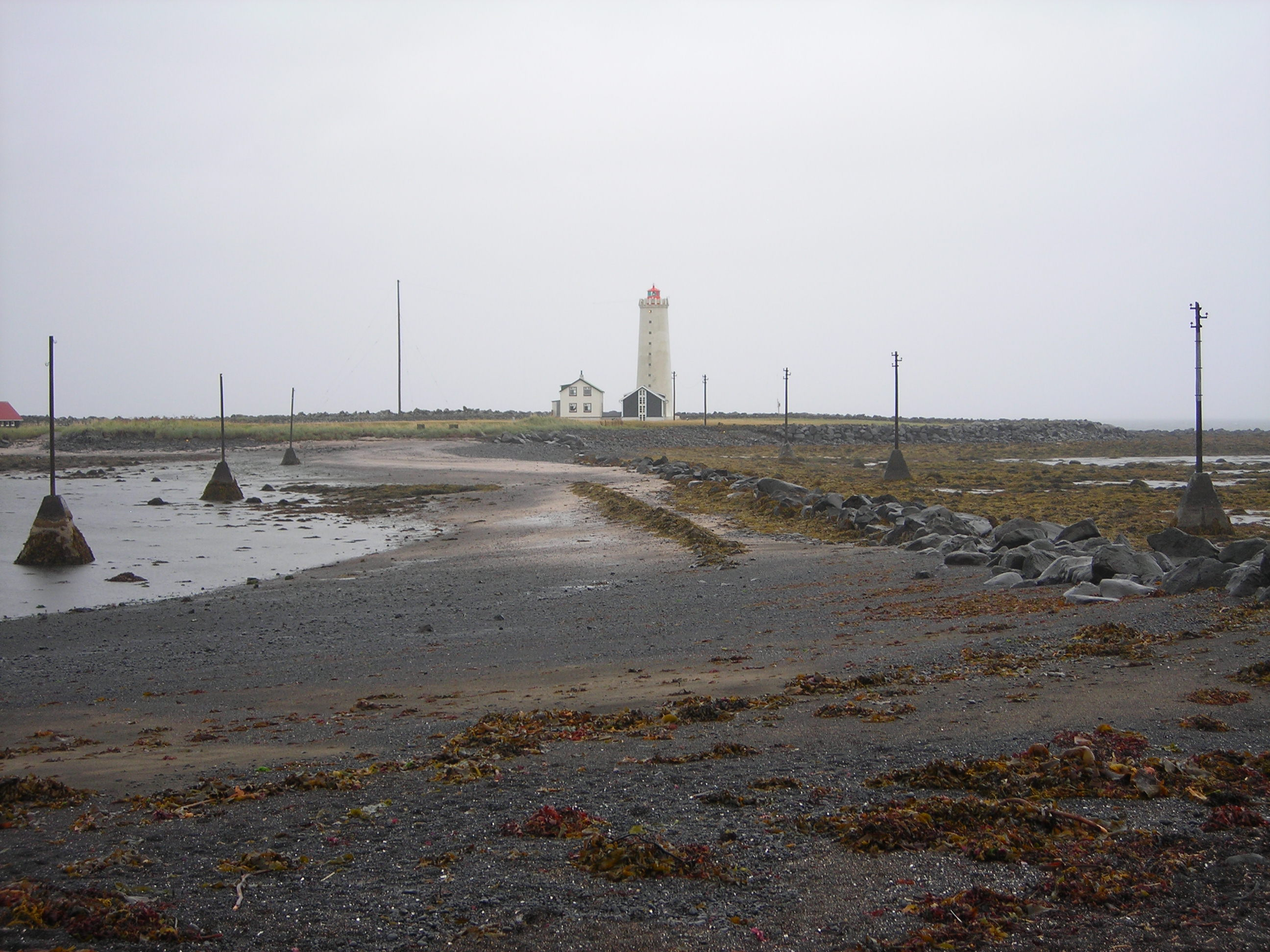 Seltjarnarnes - isola del faro di Grótta, raggiungibile a piedi durane la bassa marea